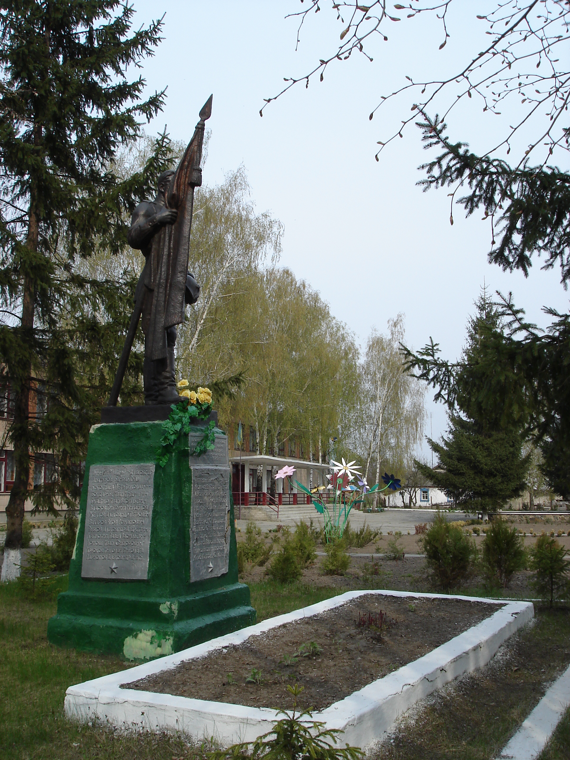 Заречье, памятник у школы